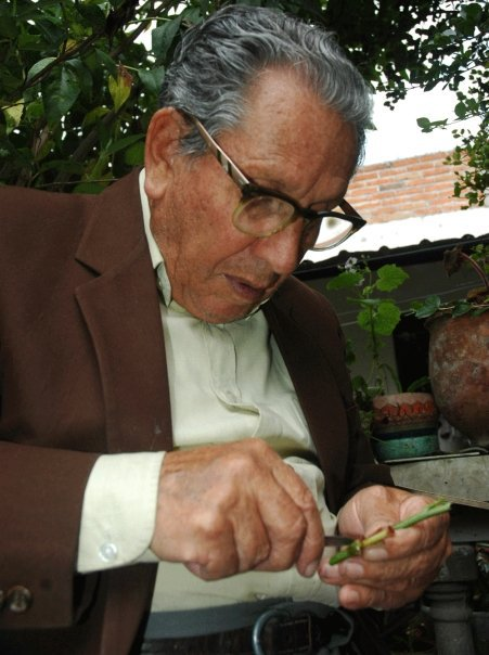 Foto tomada en la casa de Germán Rodrigo Bastidas Vaca por su hija Maria de los Angeles Bastidas de Janon, conocida fotografa de la Region y subida a wikipedia por su nieta Jessica Mateus Bastidas